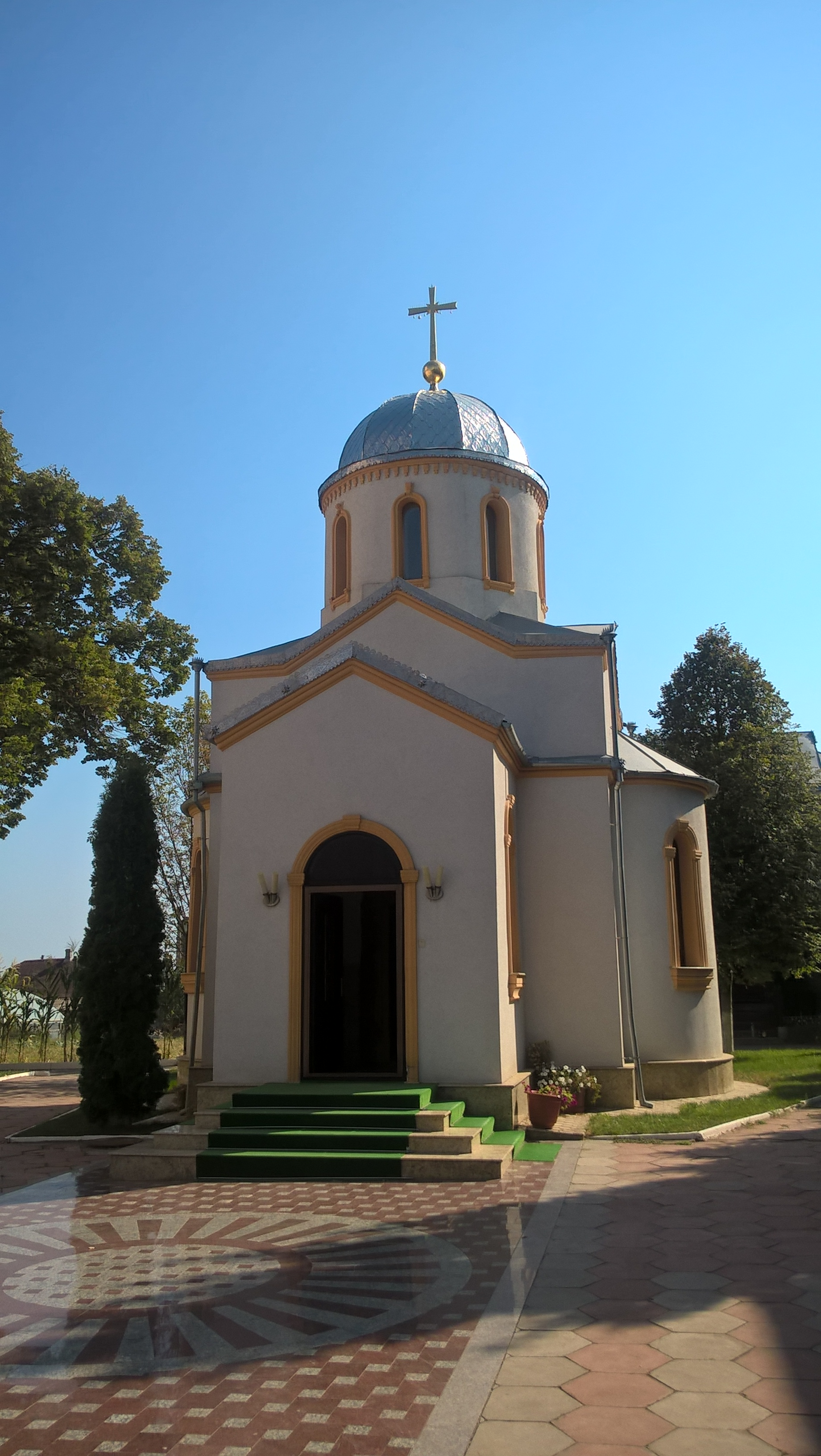 Cerkiew nagrobna w monasterze Nowy Neamț